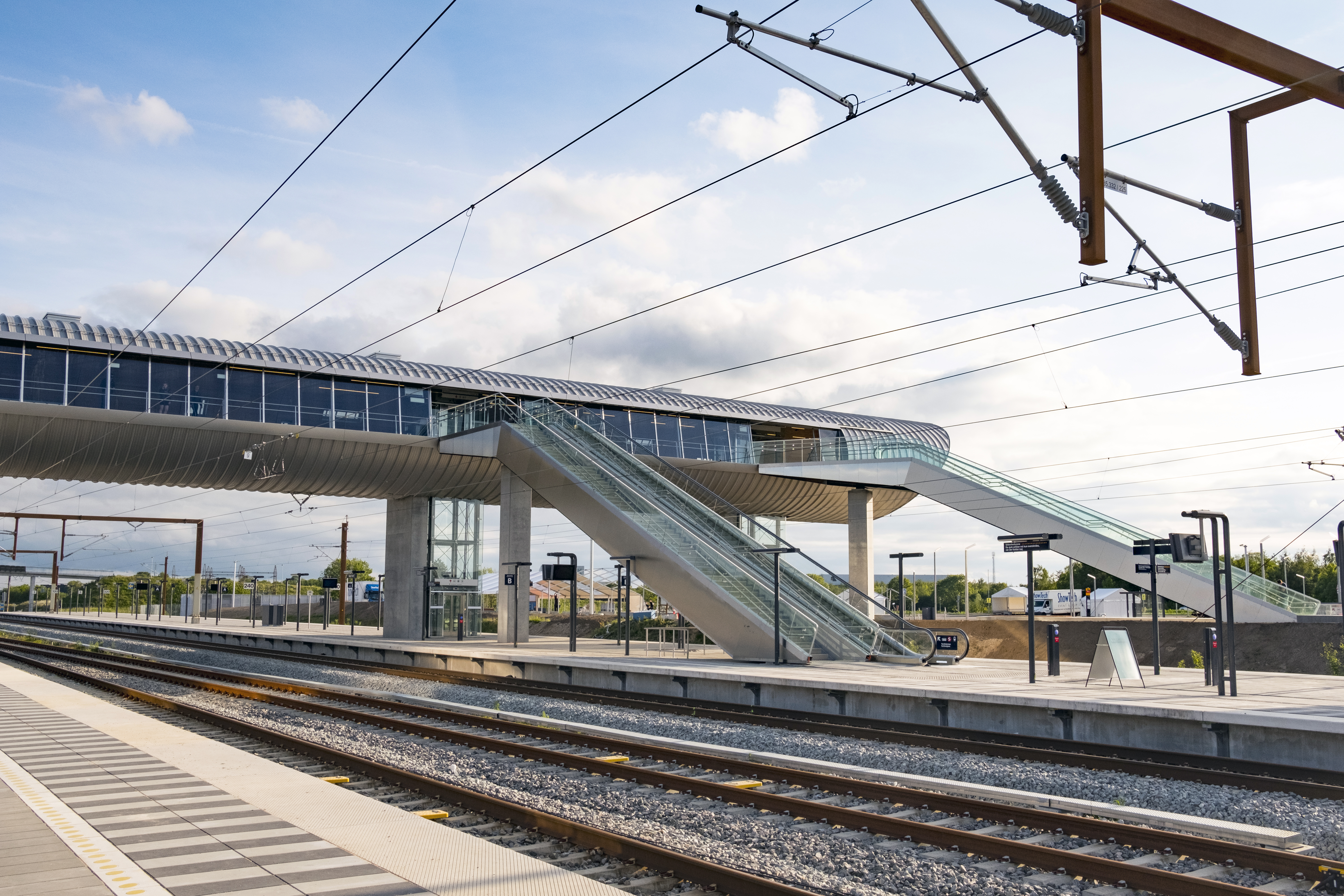 Den 31 maj 2019 invigdes Danmarks första höghastighetsjärnväg - Ringstedbanen - 60 kilometer järnväg från Köpenhamn via Køge till Ringsted med en högsta möjlig hastighet på 250 km/h. Bild från nya stationen Køge Nord. Järnvägen knyter såväl an till Stora Bältbron som till den kommande tunneln under Fehmarn Bält med tågtrafik till Hamburg. Ringstedbanen har kostat 10 miljarder danska kronor och byggdes mellan 2010 och 2019. Ringstedbanen invigdes av kronprins Frederik av Danmark. Järnvägstrafiken startade dagen efter invigningen och till en början med ett tåg per timme i 120 km/h för att i juli öka farten till 180 km/h. Det tar några år innan höghastighetsbanans högsta hastighet på 250 km/h kan nås - först ska nya signalsystem bli klara och nya snabbare tåg köpas in av DSB. På bilden den nya järnvägsstationen Køge Nord där en metallglänsande ormliknande byggnad svävar över Danmarks största motorväg, den nya järnvägen, S-tog (pendeltåg) och bussar. Stationsbyggnaden är ritad av Dissing+Weitling samt Cobe och nominerades i kategroin ”Best Futura Project”, Mipim Awards 2015. Photo: News Øresund - Johan Wessman © News Øresund - Johan Wessman (CC BY 3.0) Detta verk av News Øresund är licensierat under en Creative Commons Erkännande 3.0 Unported-licens (CC BY 3.0). Bilden får fritt publiceras under förutsättning att källa anges. .The picture can be used freely under the prerequisite that the source is given. News Øresund, Malmö, Sweden News Øresund är en oberoende regional nyhetsbyrå som är en del av det oberoende dansk-svenska kunskapscentrat Øresundsinstituttet.